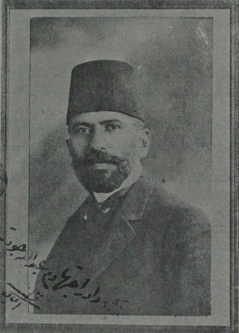 Süleyman Nazif'in Nevsal-i Milli 1330'dan alınmış fotoğrafı.